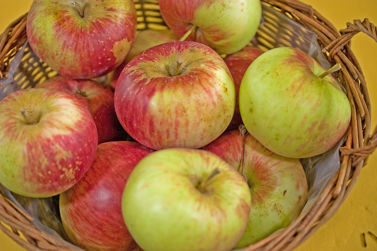 Der Pohorka ist ein sehr guter Tafelapfel. Die Sorte Pohorka entstand aus einer Kreuzung von Cox Orangenrenette und des Ontarioapfels. Die Frucht ist sehr gut zu lagern. Das Fruchtfleisch ist saftig, süßsäuerlich mit guten Aroma. Der Apfel ist von Dezember bis Juni genussreif.